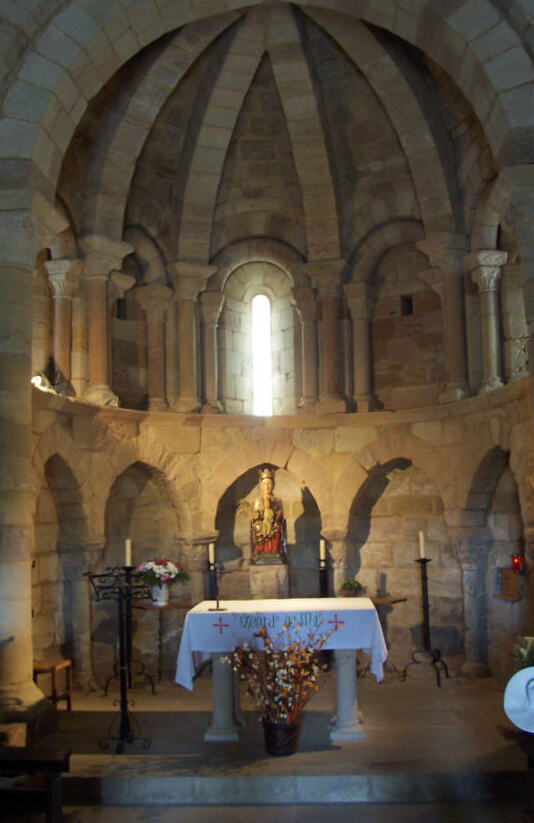 interior de la/innenansicht der/inside the church iglesia santa maria de eunate